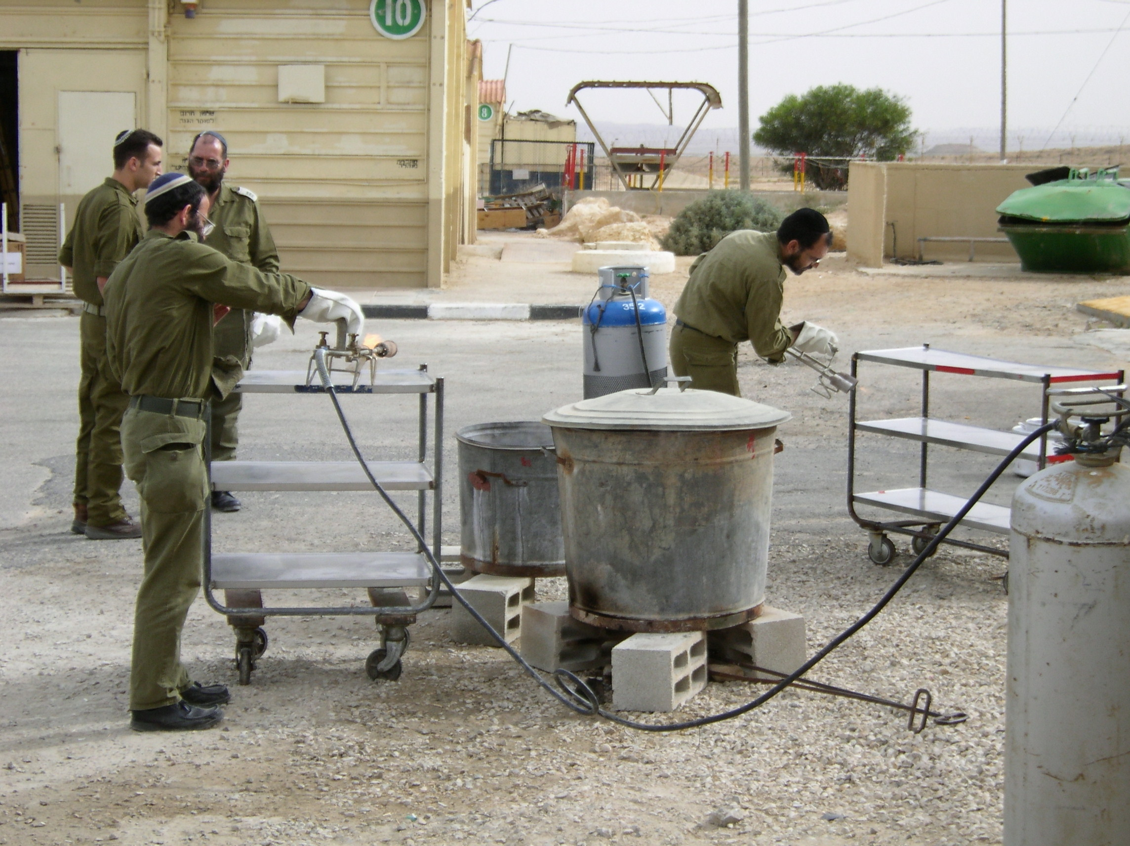 Kaschern von Küchengeräten vor Pessach unter Aufsicht eines Militärrabbiners auf einem IDF-Stützpunkt im Negev